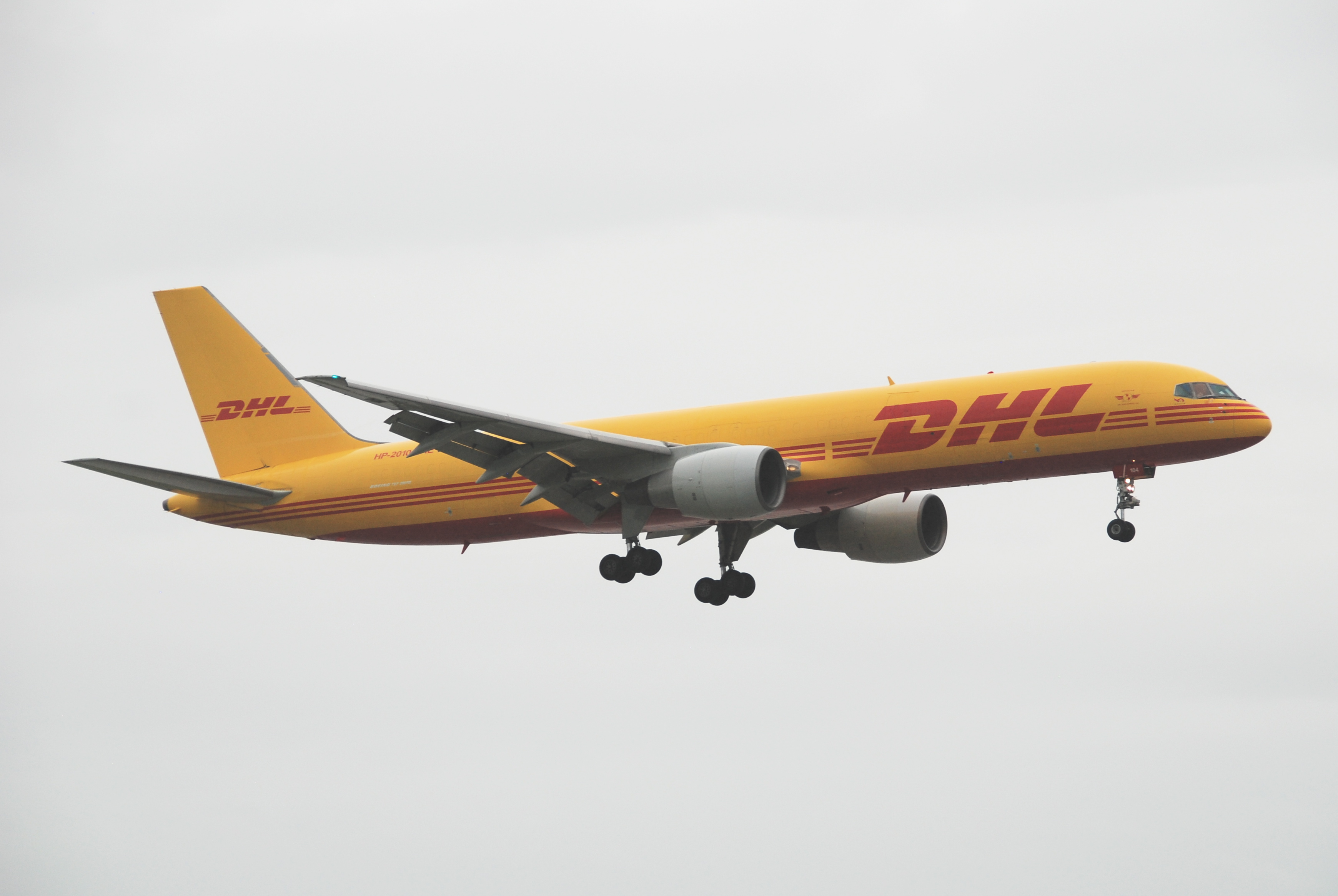 DHL Boeing 757-27AF; HP-2010DAE@MIA;17.10.2011/626dk